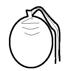 Ocurre una invaginacion y posteriormente inresa el tubo a la vesícula